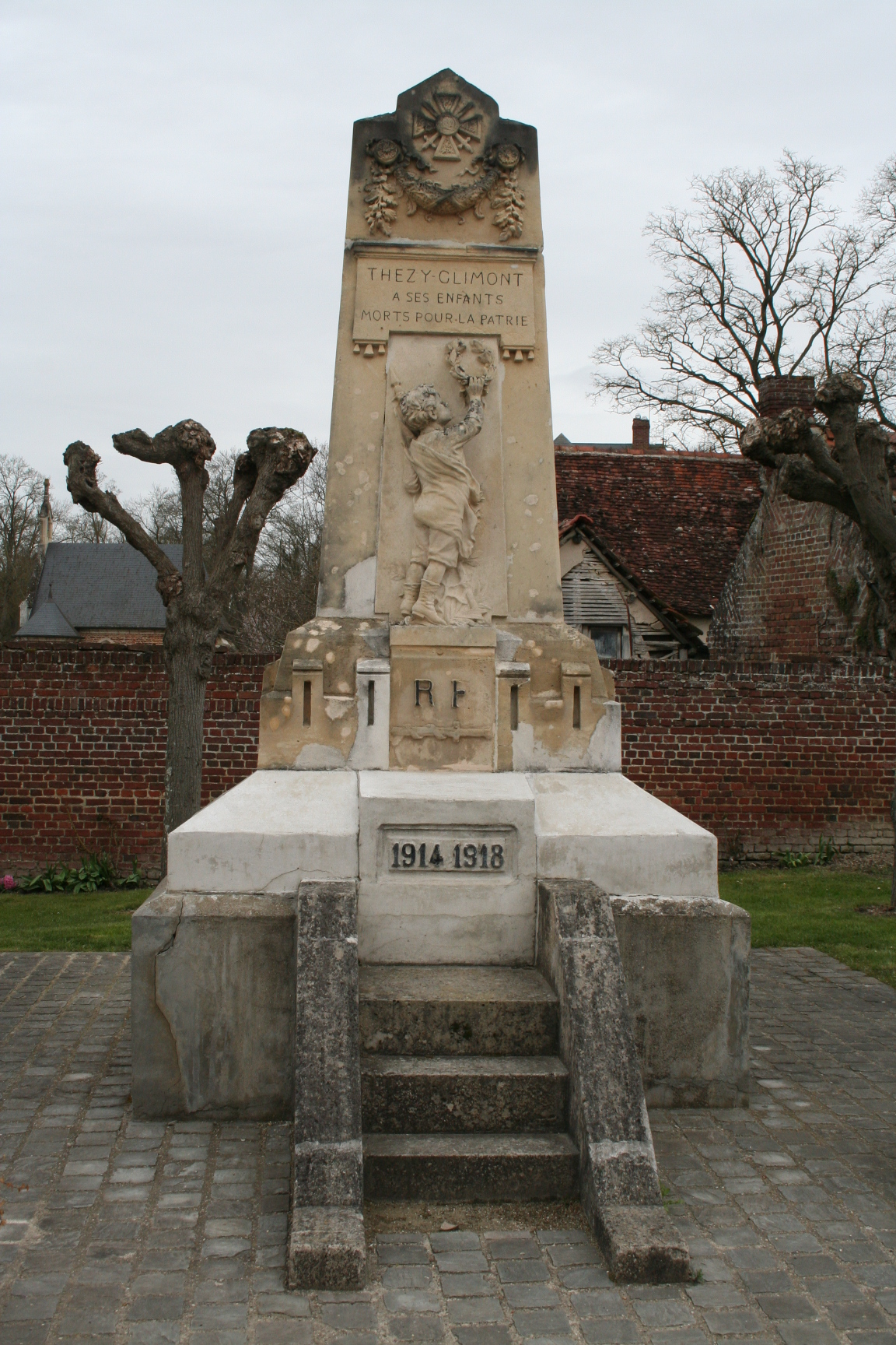 Picard: Monumint à chés morts - Tézin-Glimont, Sonme, Picardie